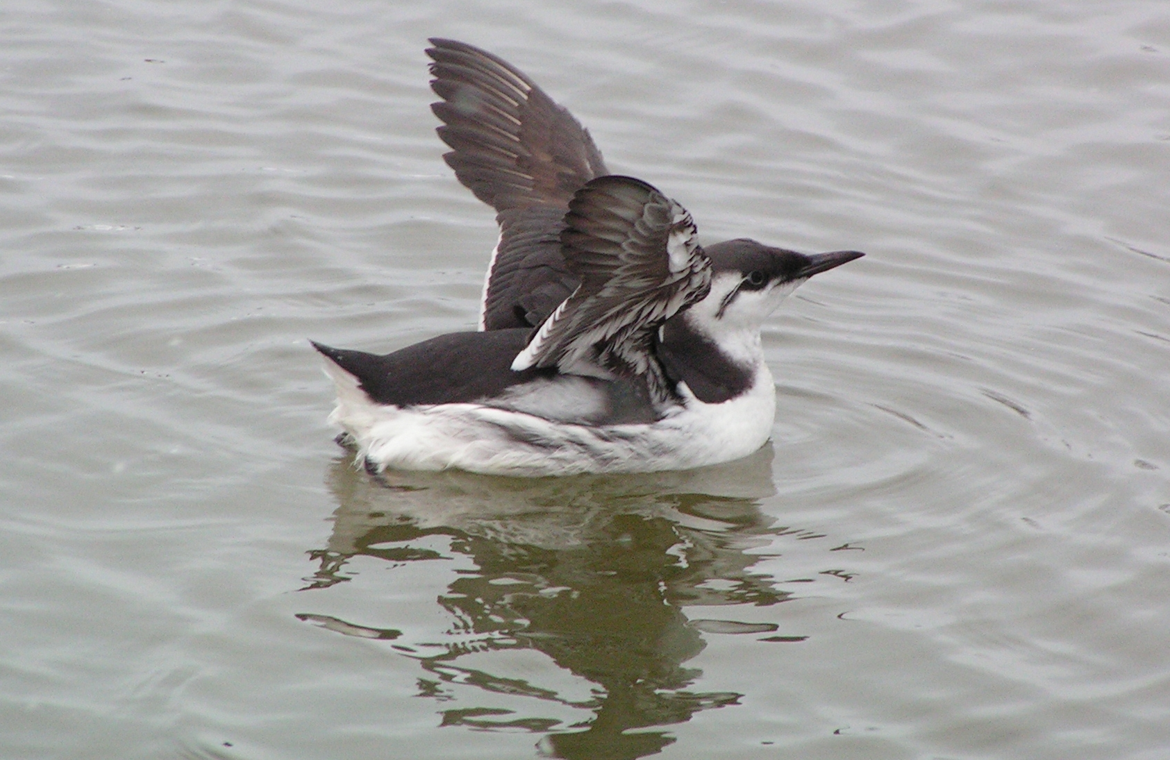 Uria Aalge at german Nationalpark Schleswig-Holsteinisches Wattenmeer. Author: M.Buschmann